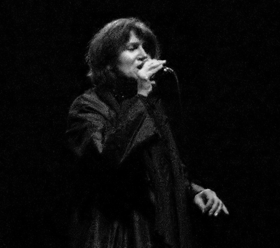 Halina Frąckowiak na koncercie. Wrzesień 2007